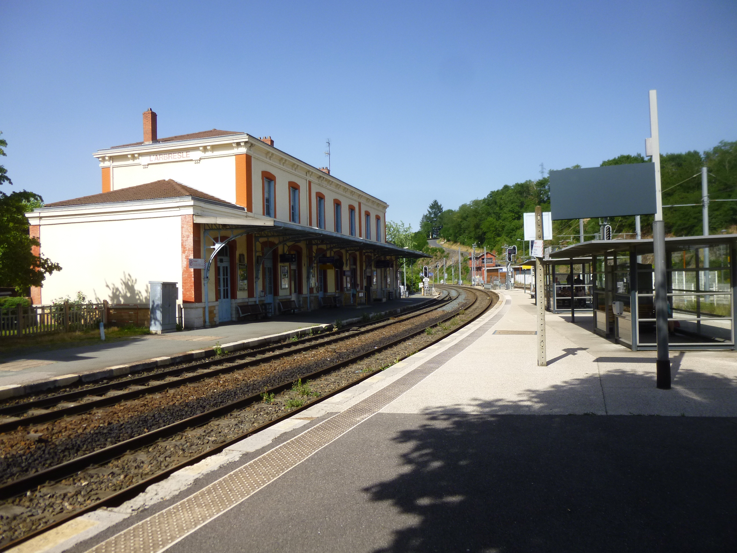 La gare de L'Arbresle, ligne Lyon -Roanne à gauche, ligne Lyon-Sain Bel à droite